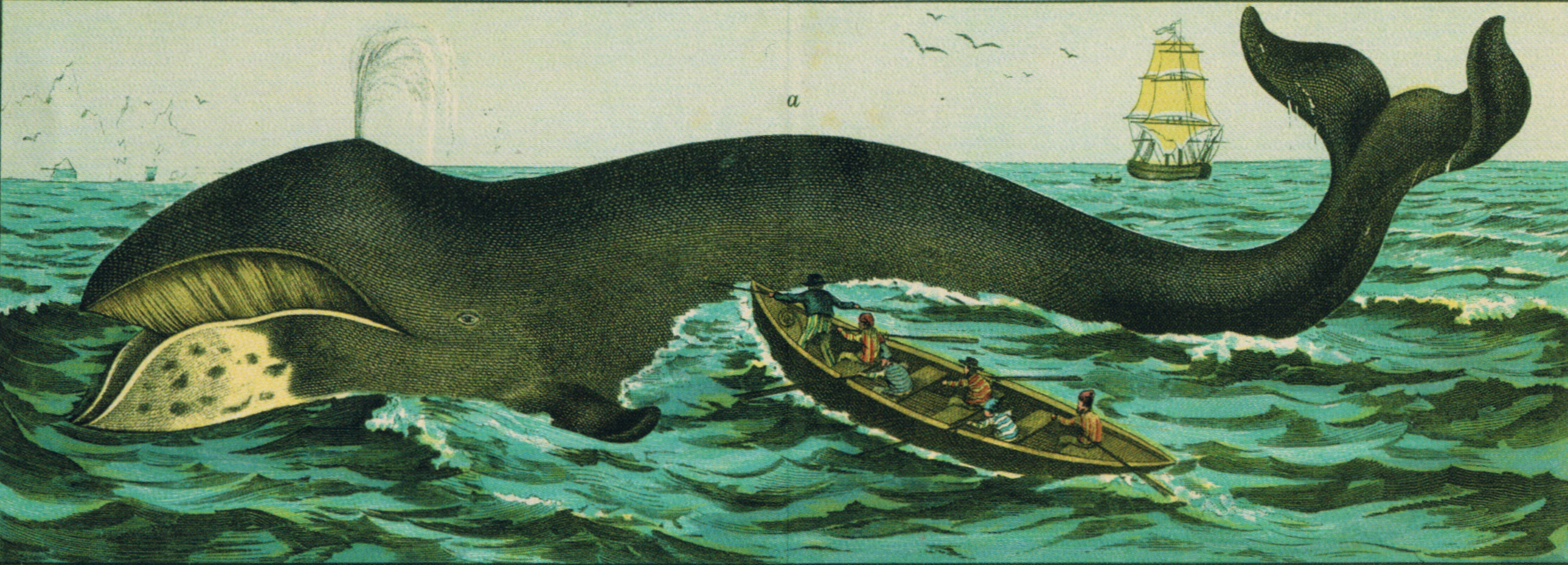 Bartenwal, Zeichnung un 1870